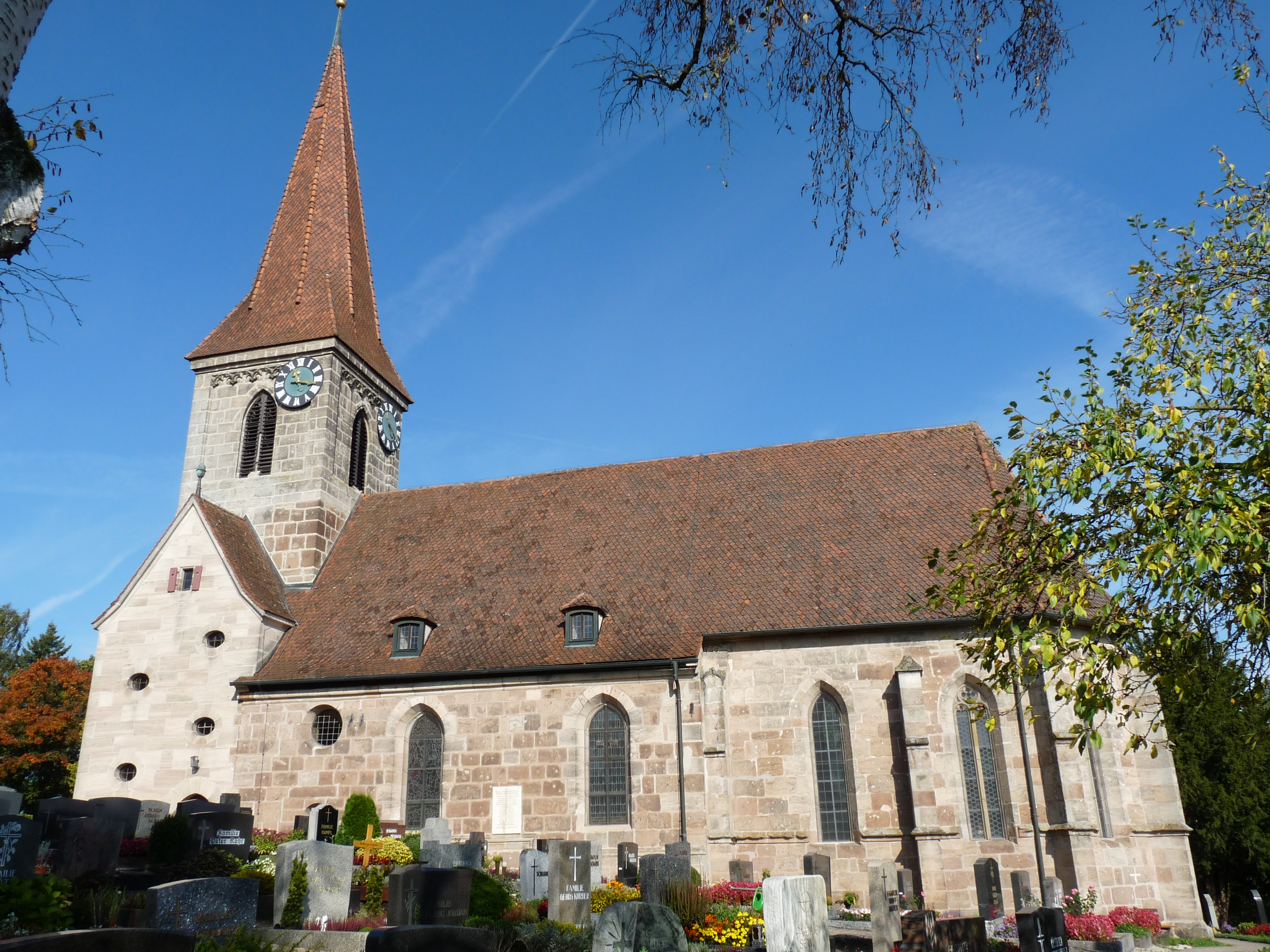 Die Evang.-lutherische Walburgskirche mit dem Friedhof von Süden her fotografiert. Sie thront am hohen Kirchberg in Großhabersdorf und an klaren Tagen kann man von der Anhöhe sogar die Türme der fränkischen Großstadt Nürnberg sehen. "Nach Helmut Mahr ist sie frühestens um 900 spätestens 1057 - 1075 gebaut worden. Da die Kirche in Großhabersdorf der heiligen Walburga gewidmet war, deren Heiligsprechung um 870 - 879 erfolgte, kann das ihr geweihte Gotteshaus erst nachher entstanden sein. Die Kirche ist ein gotisches Bauwerk mit Westturm, Langhaus und Chor (Entnommen aus Großhabersdorf - Eine Gemeinde im Wandel der Geschichte von Michael Kroner)" Die Kirche ist schlicht im Inneren; ein kleiner Barockaltar mit zwei gedrehten Säulen befindet sich vor der Orgelempore. Bunte Glasfenster in kräftigen Farben, Meisterwerke des Nürnberger Kunstkreises aus dem 14. Jahrhundert, leuchten zu beiden Seiten der Orgel. Seit 1516 zeigt die Großhabersdorfer Turmuhr die Stunden an.